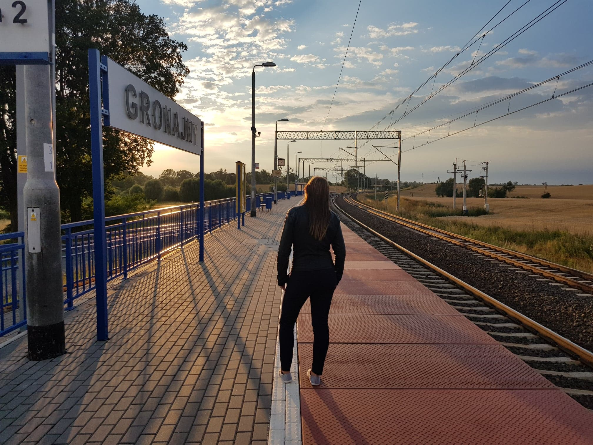 Przystanek kolejowy Gronajny